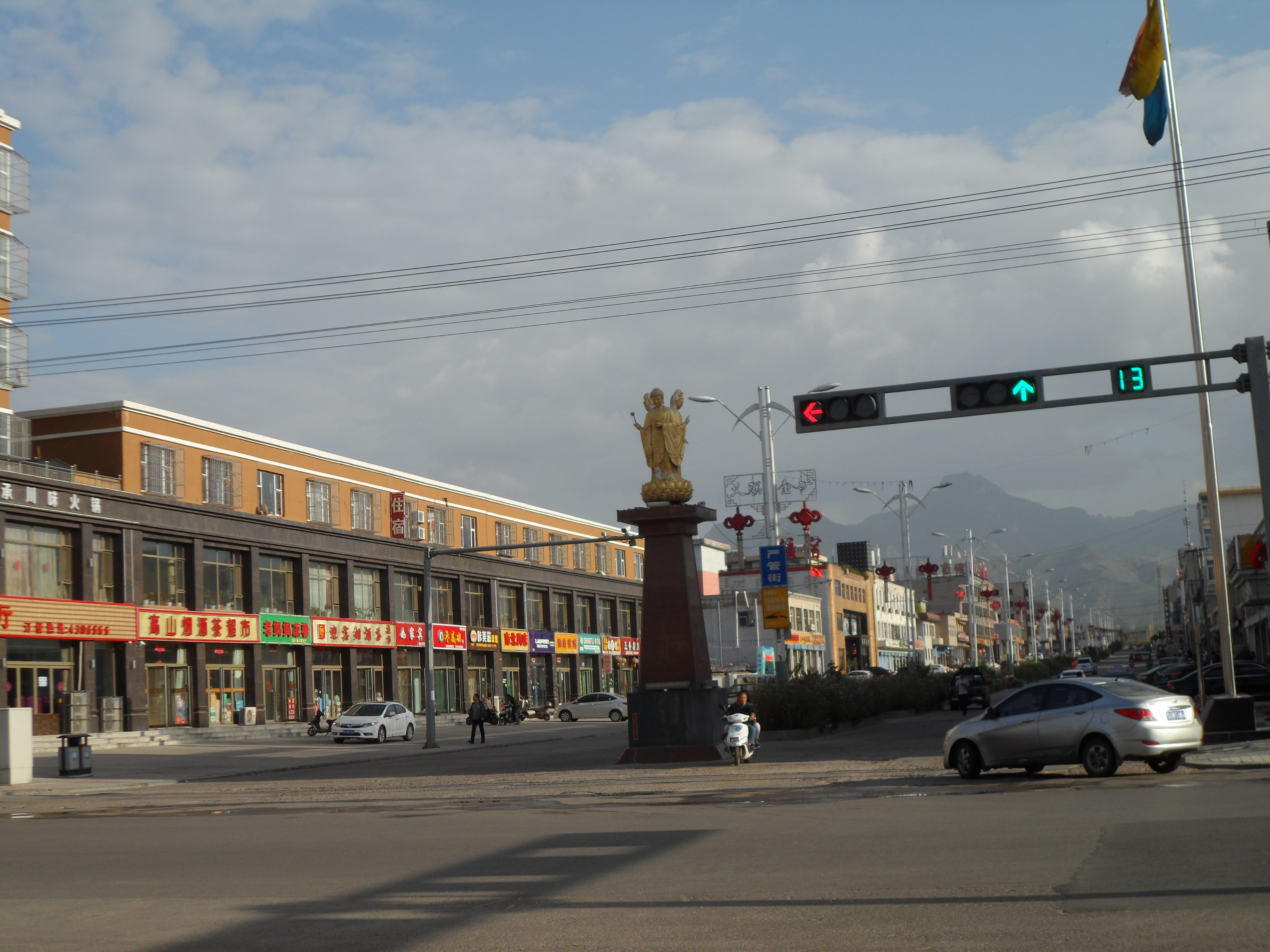 山西砂河镇五台山站前街景